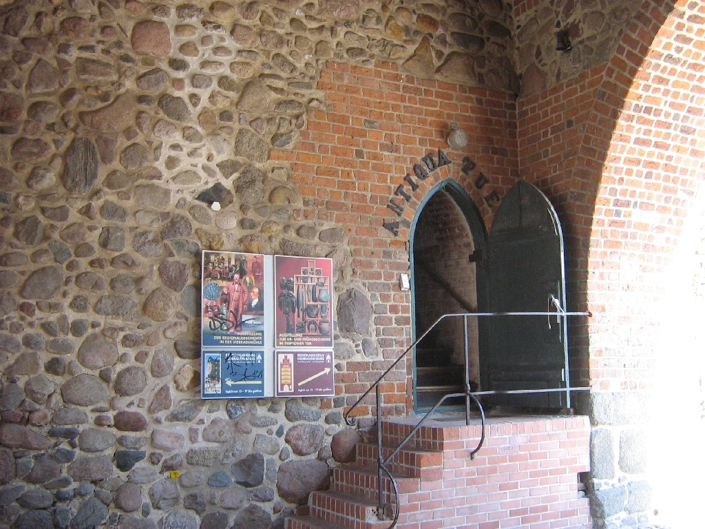 Das Treptower Tor in Neubrandenburg (Mecklenburg-Vorpommern, Germany). Das Treptower Tor ist das prächtigste Tor der norddeutschen Backsteingotik und beherbergt seit über 100 Jahren ein Museum. Auf dem Bild ist der Eingang des Museums zu sehen.